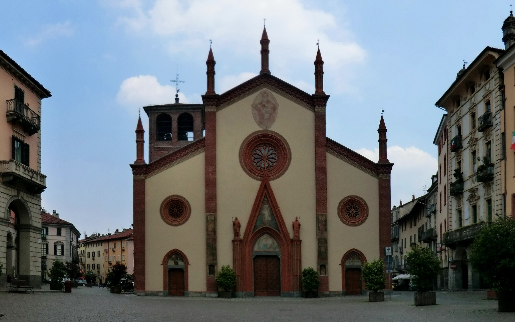 Pinerolo Cathedral San Donato Native nameDuomo di PineroloLocationPinerolo, ItalyCoordinates44° 53′ 08.49″ N, 7° 19′ 48.5″ E WebsiteParrocchia di San Donato nella Cattedrale